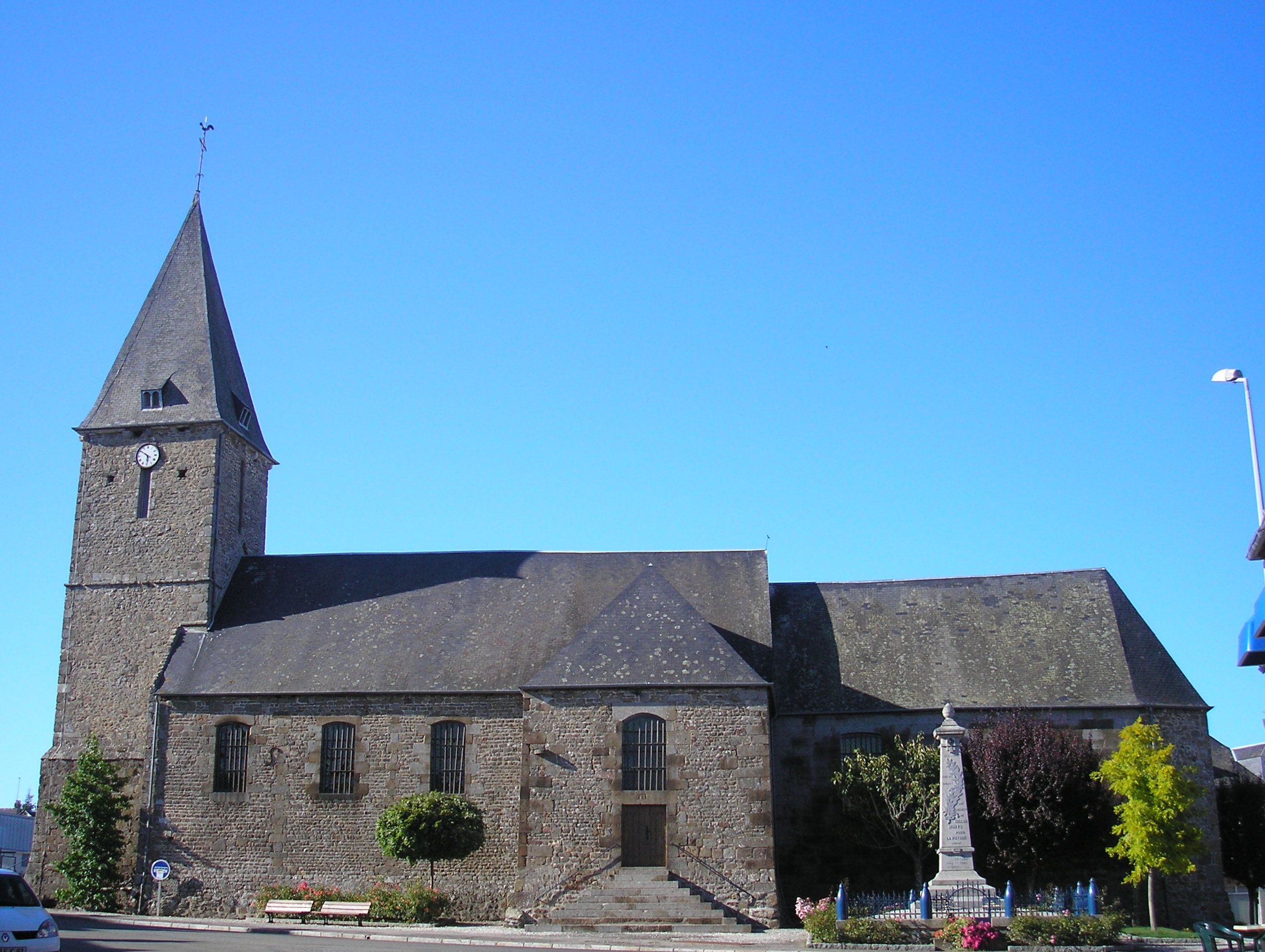 Bellou-en-Houlme (Normandie, France). L'église Notre-Dame.